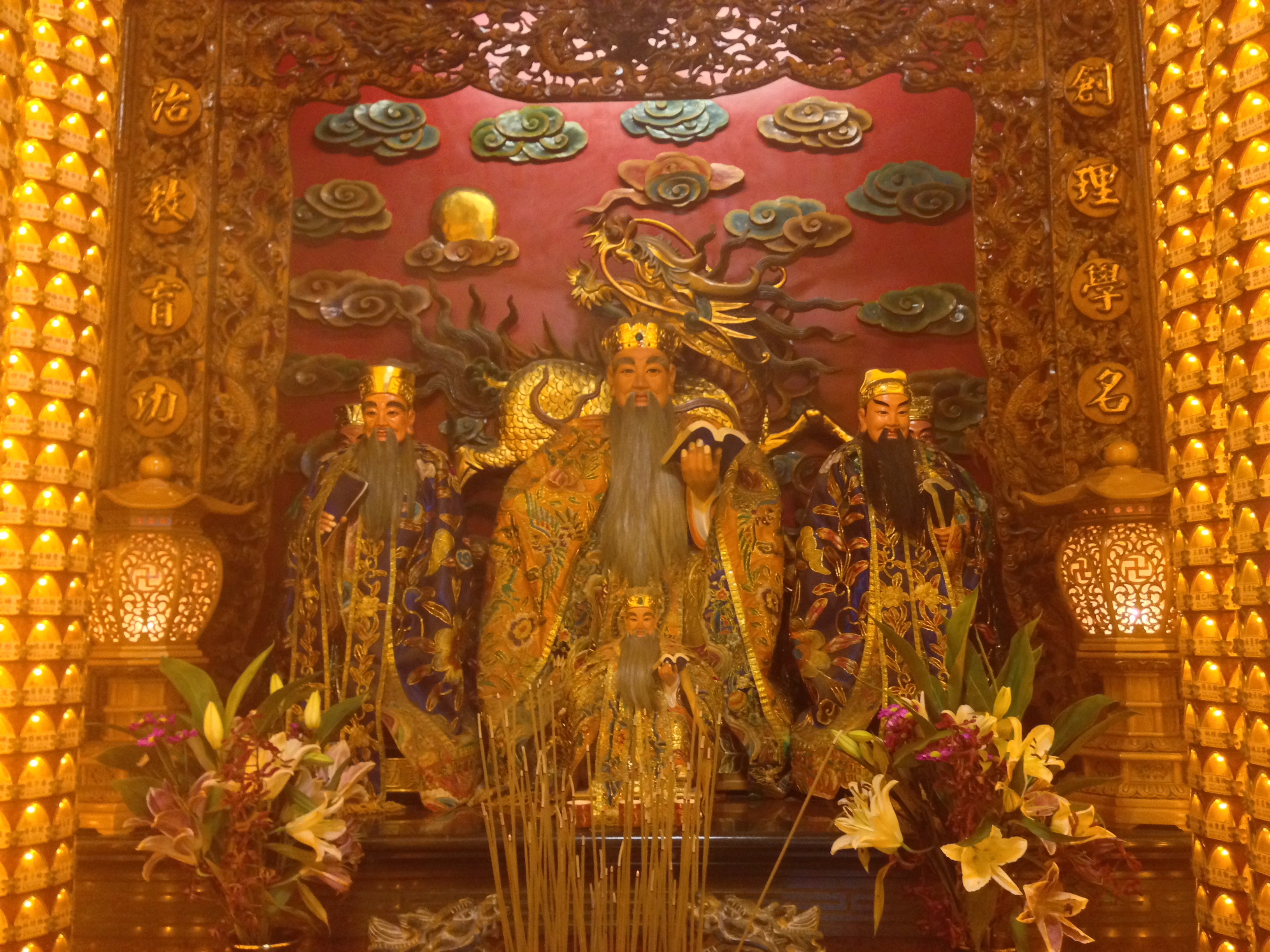 中文（台灣）: 台北市文昌宮朱衣神君神像